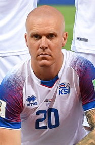 Сборная Исландии уступает Хорватии и покидает ЧМ-2018